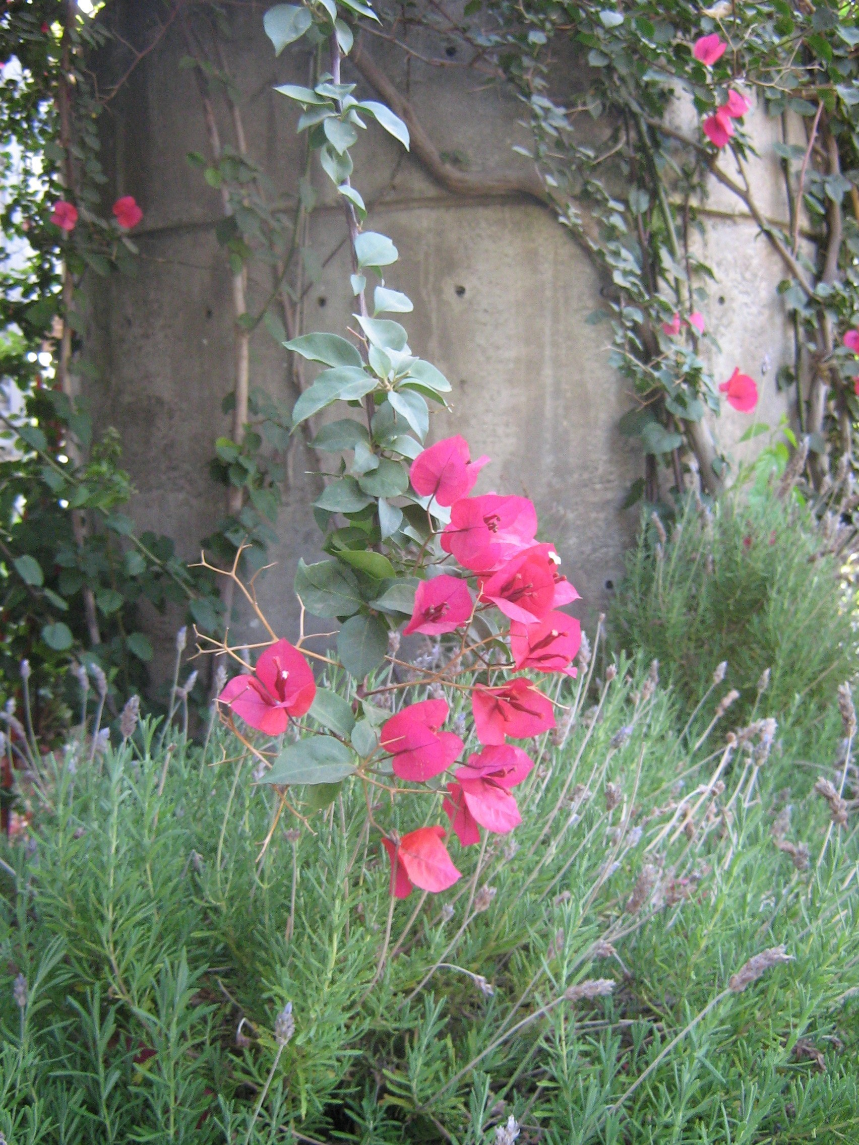 Bougainvillea ex hortus